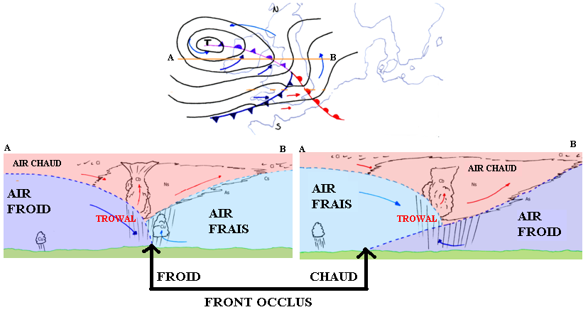 Front occlus lorsque le front froid rattrape le front chaud. Il y a deux types montrés sur les coupes (AB): soit le front froid passe sous l'air doux à l'avant du front chaud, soit il passe au-dessus.